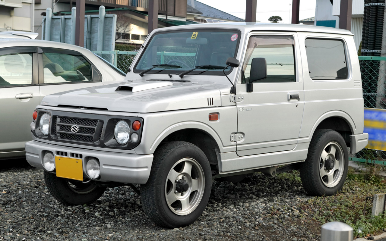 Suzuki Jimny 660 Hardtop XL Limited ( JA12W )